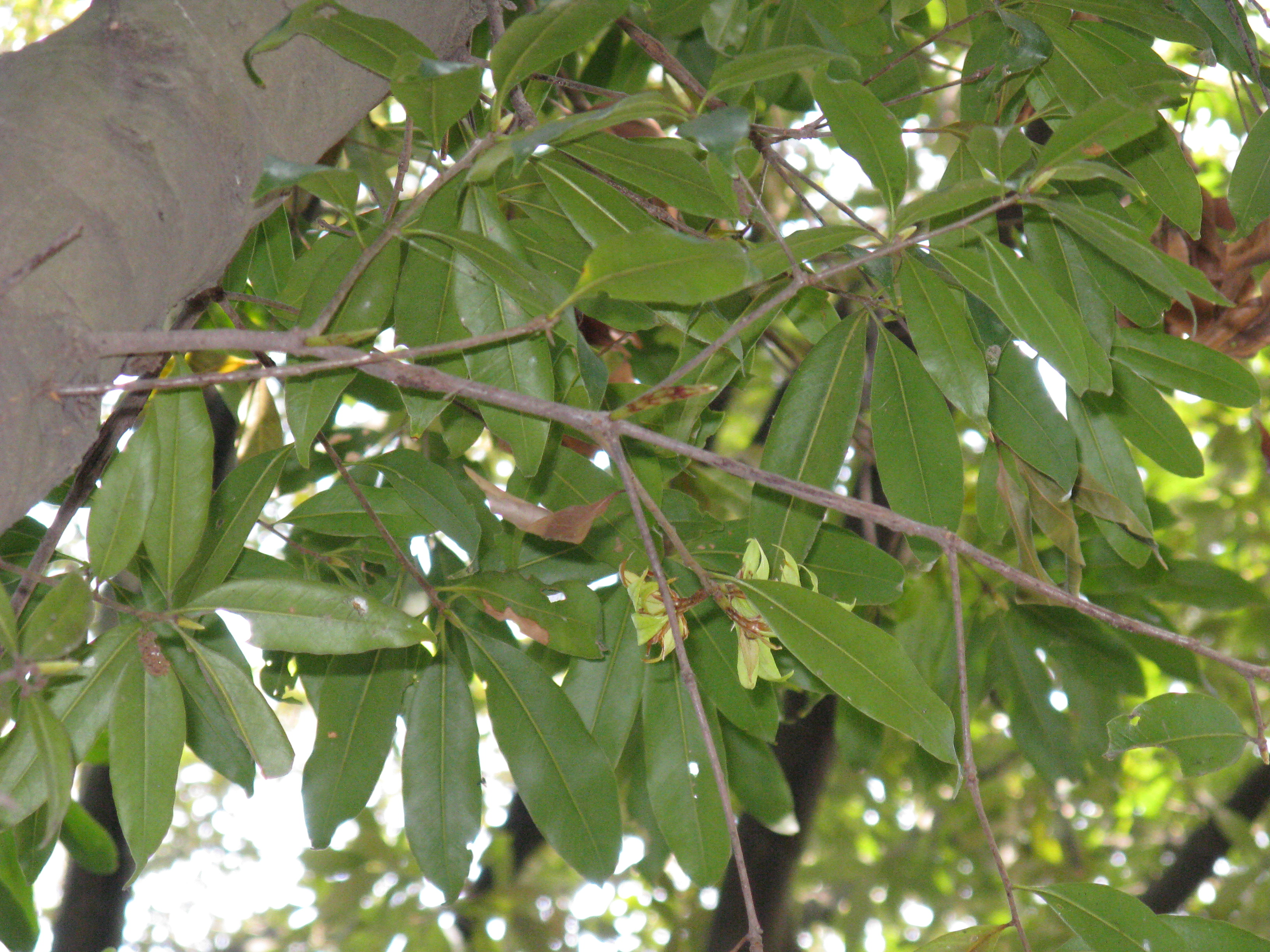 Quercus sessilifolia(=Cyclobalanopsis sessilifolia)